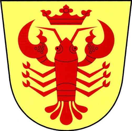 Znak, Rovensko, okres Šumperk